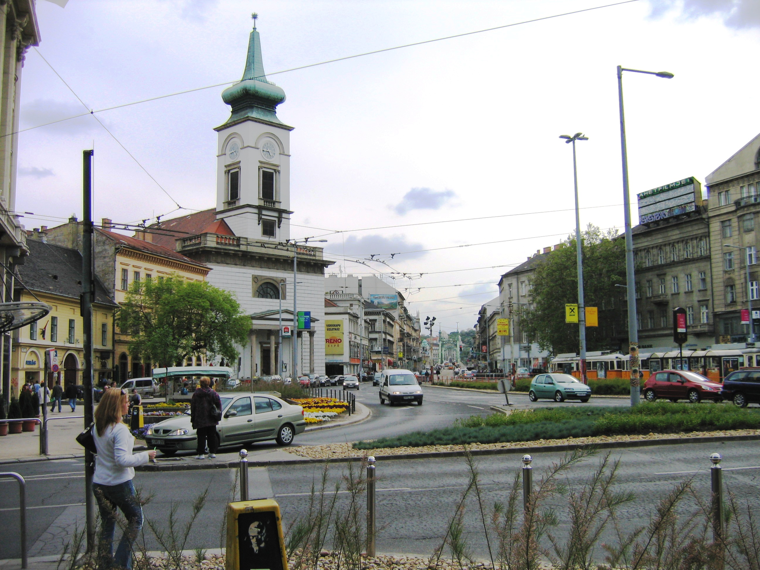 Kalvin Square, Budapest, Hungary